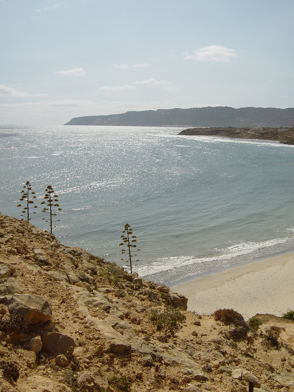 Plage de Sounine (Tunisie)